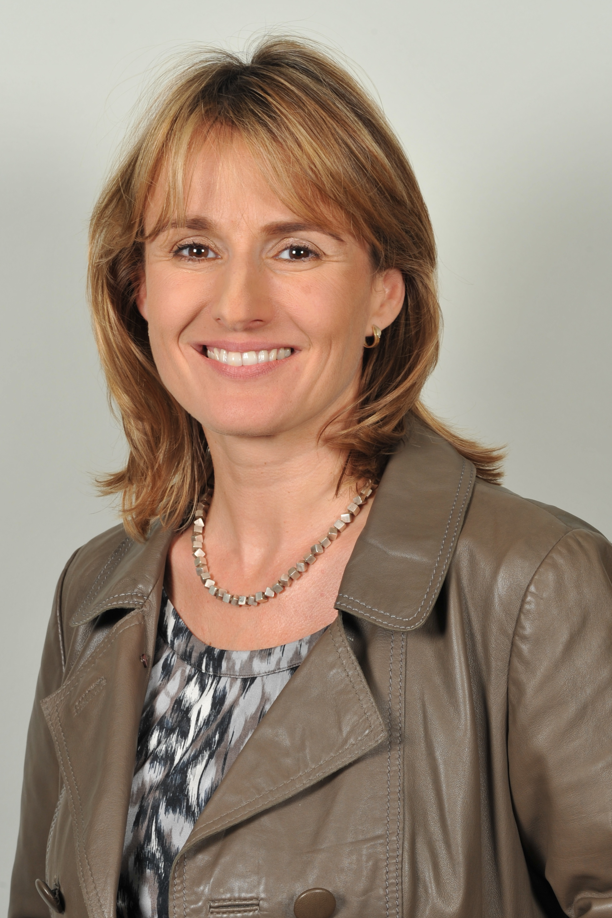 Landtagsprojekt Baden-Württemberg 2013: Katrin Schütz